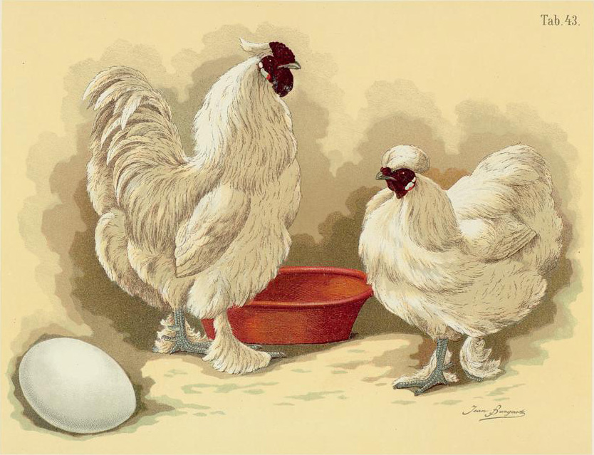 Japanisches Seiden-Huhn.Gallus dom. lanatus japanieus.Japanese Silkiy fowl.Poule soyeuse blanche huppée.